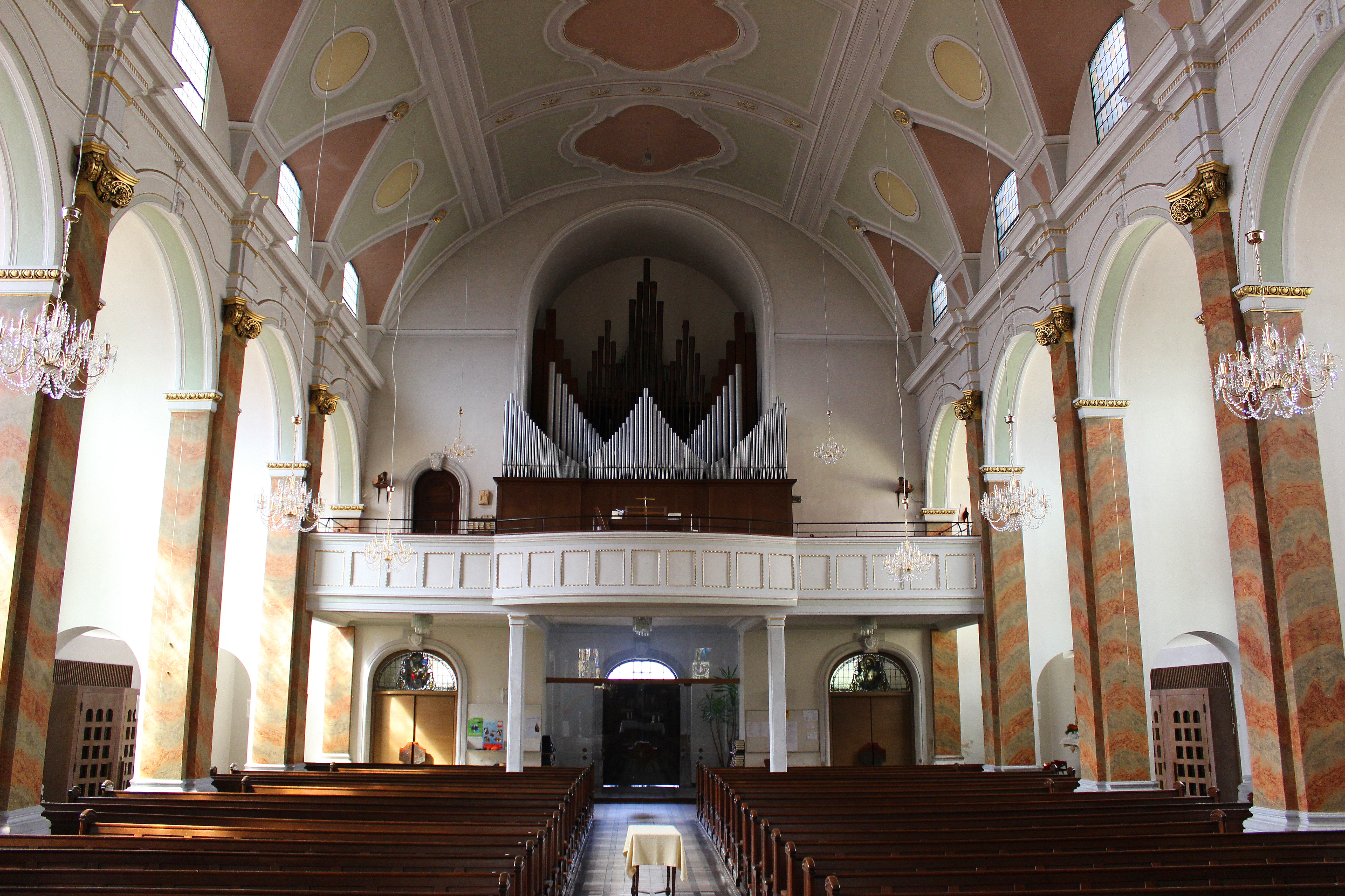 Blick ins Innere der katholischen Pfarrkirche St. Franziskus in Urexweiler, einem Ortsteil der Gemeinde Marpingen, Landkreis St. Wendel, Saarland